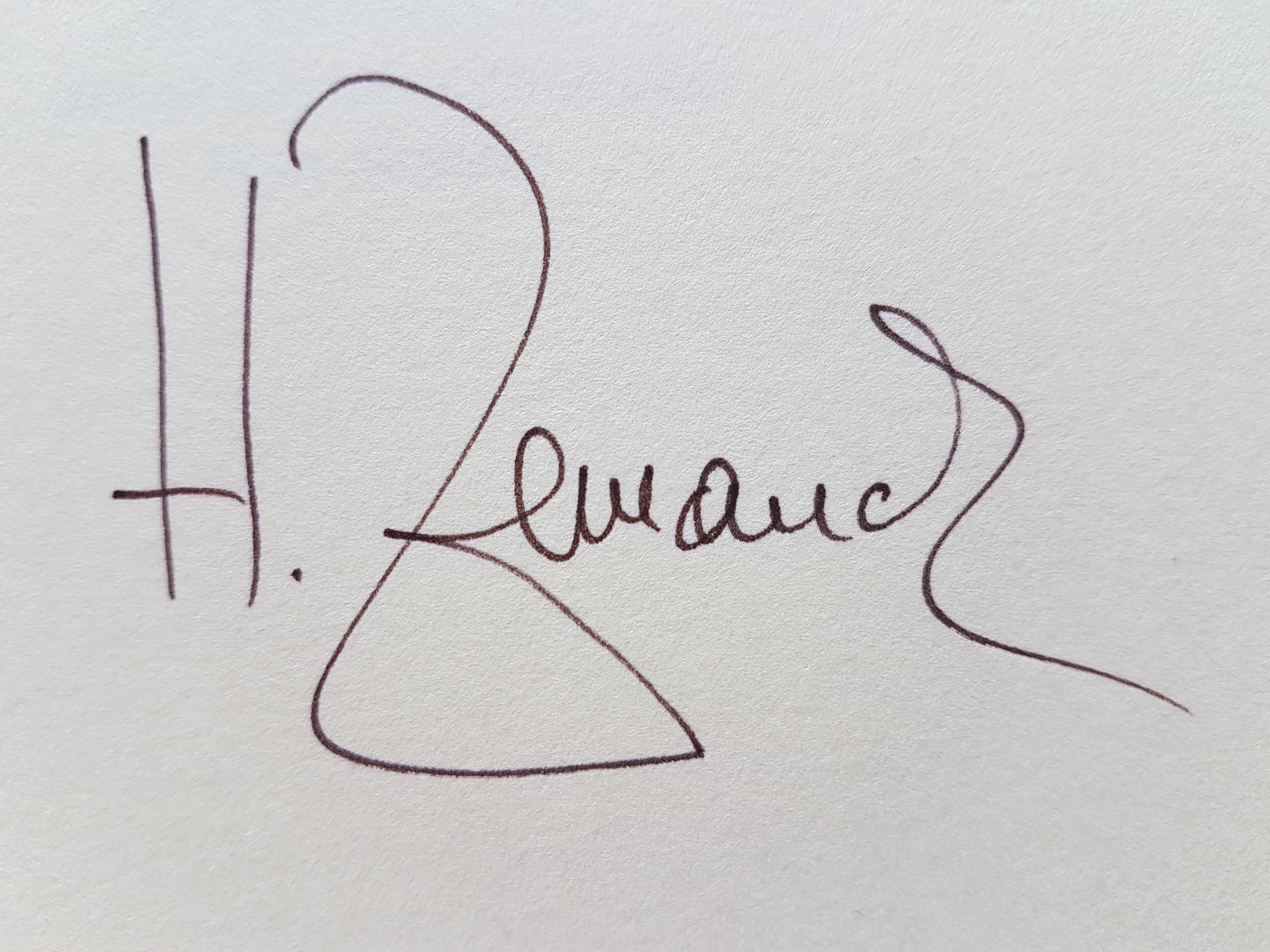 Unterschrift Heinz Zemanek (Widmung, 2007)